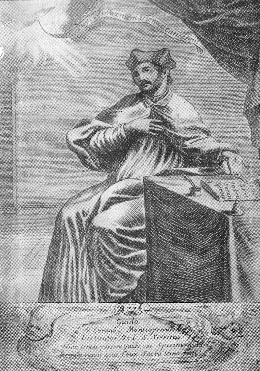 Histoire de l'Ordre Hospitalier du Saint-Esprit Auteur Paul Brune Éditeur C. Martin, 1892